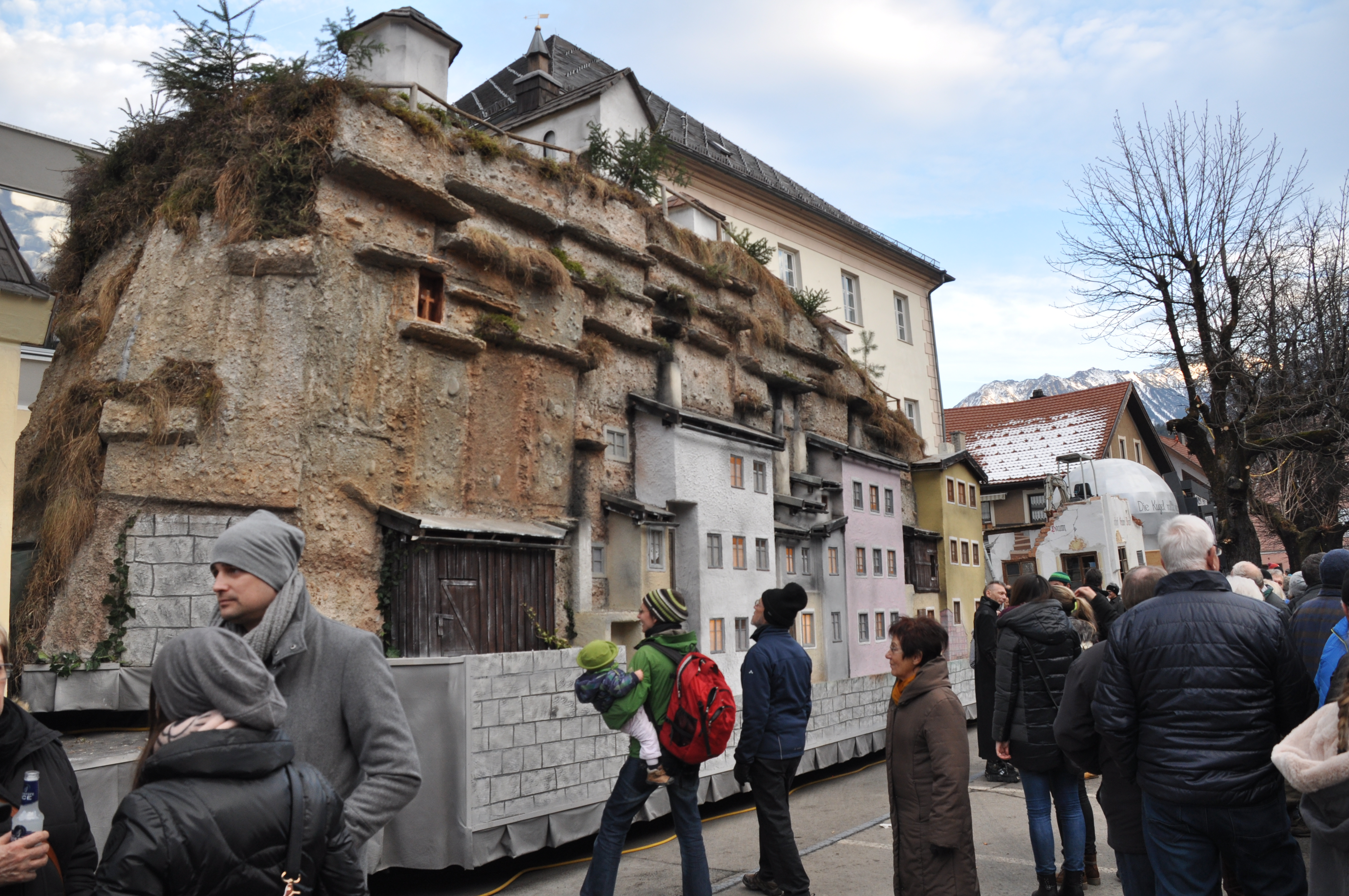 Imst (Tirol), Wagen des Imster Schemenlaufens 2016; fotografiert am Vorabend, Samstag, 30. Januar 2016 auf dem Stadtplatz Imst